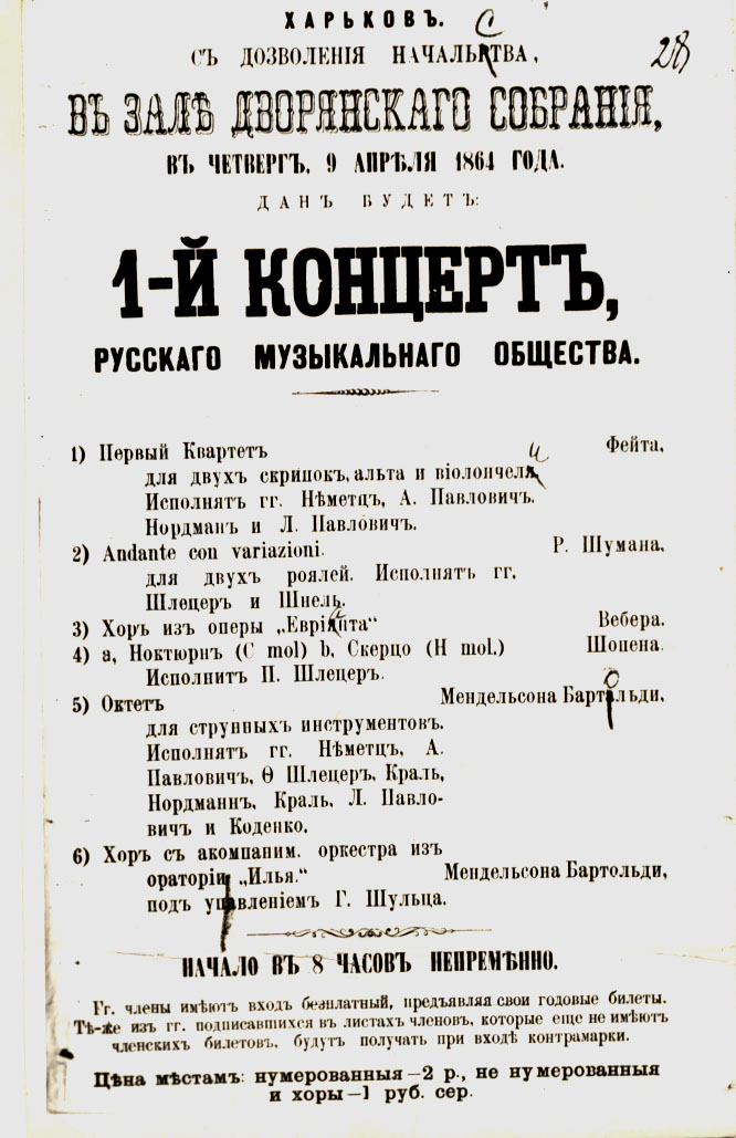 Афиша 1-го концерта Харьковского отделения Русского Музыкального Общества от 9-го апреля 1864 года.Копия с оригинала,хранящегося в Государственном историческом архиве Ленинградской области Фонд-408,опись-1,ед.хр.17.л.28